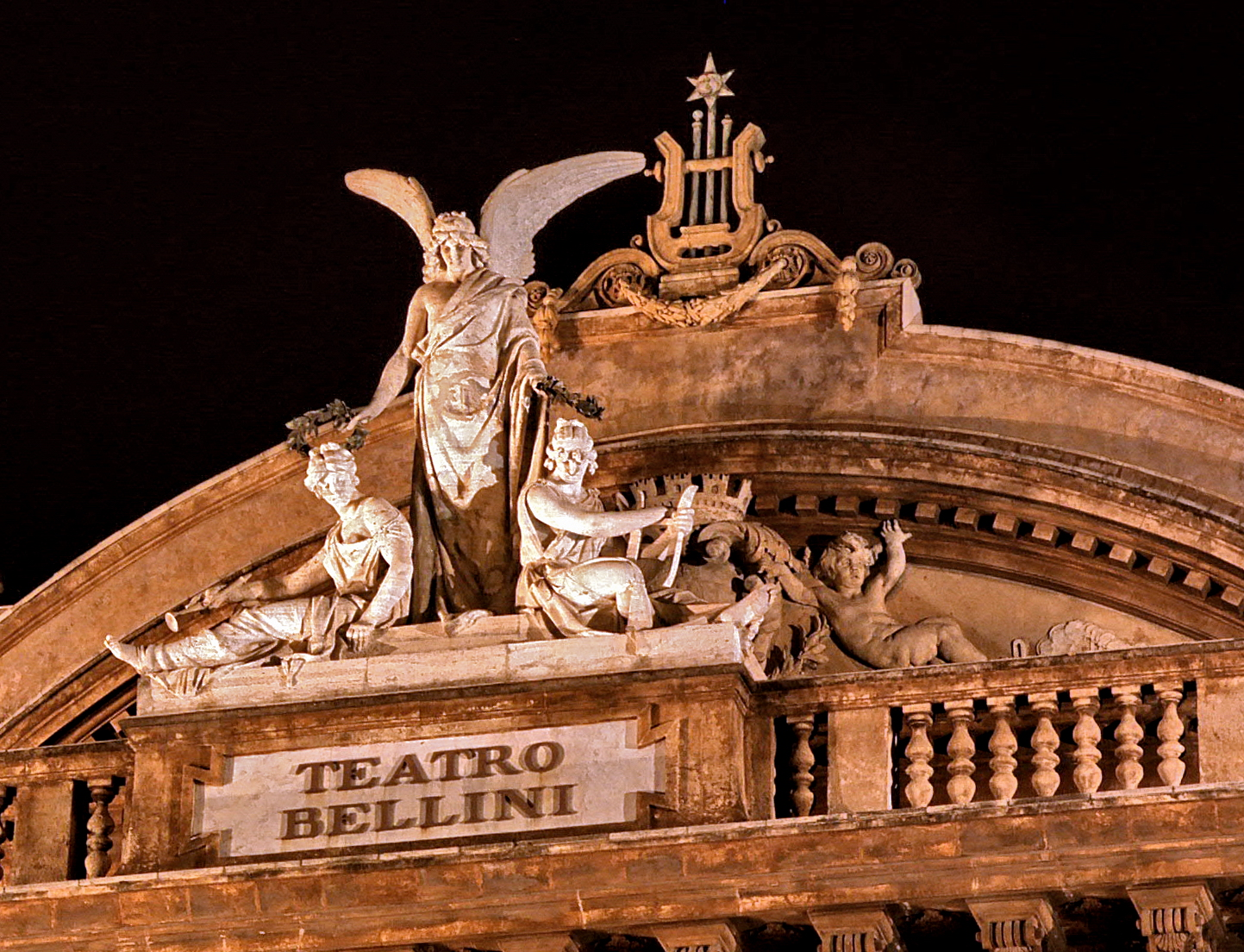 Particolare delle decorazioni sulla parte sommitale della facciata del Teatro.